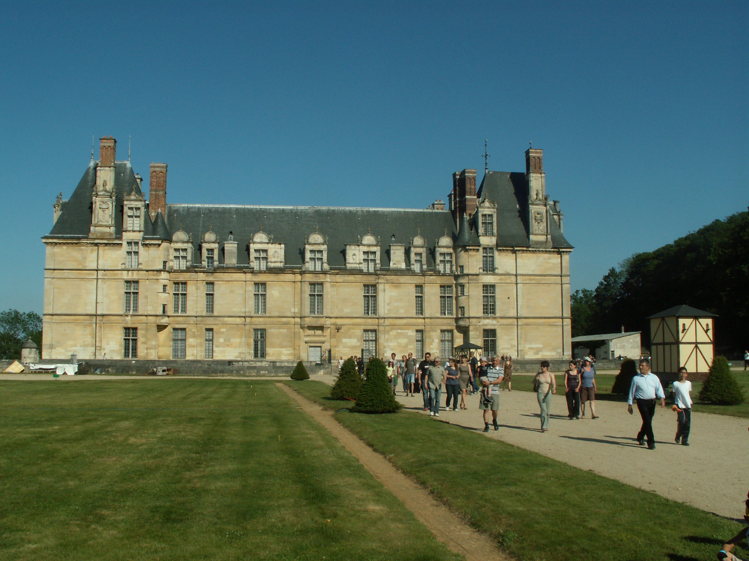 Parc et chateau d'Ecouen en 2010.